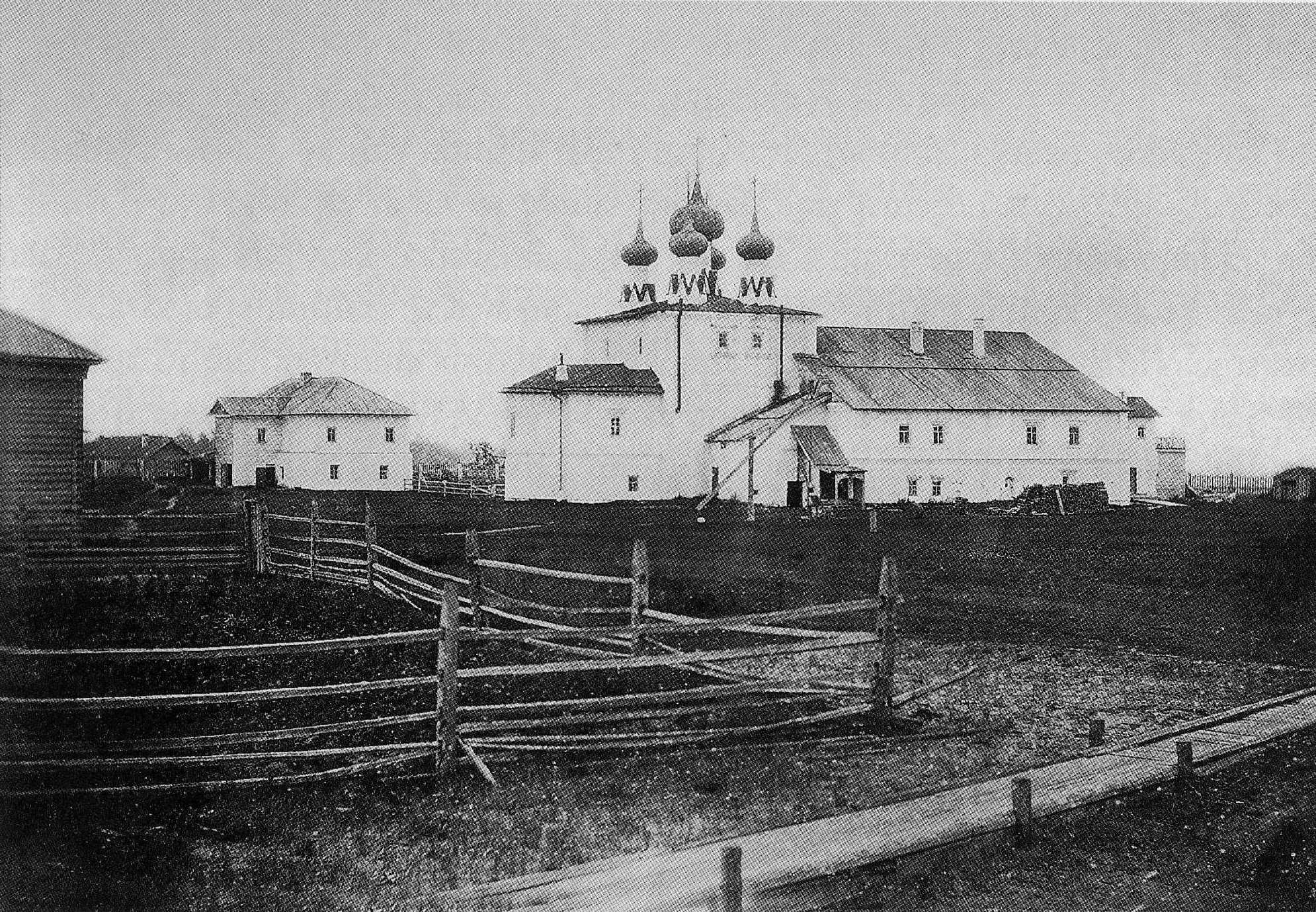 Архангельский уезд. Пертоминский монастырь. Церковь, где находились мощи Вассиана и Ионы.